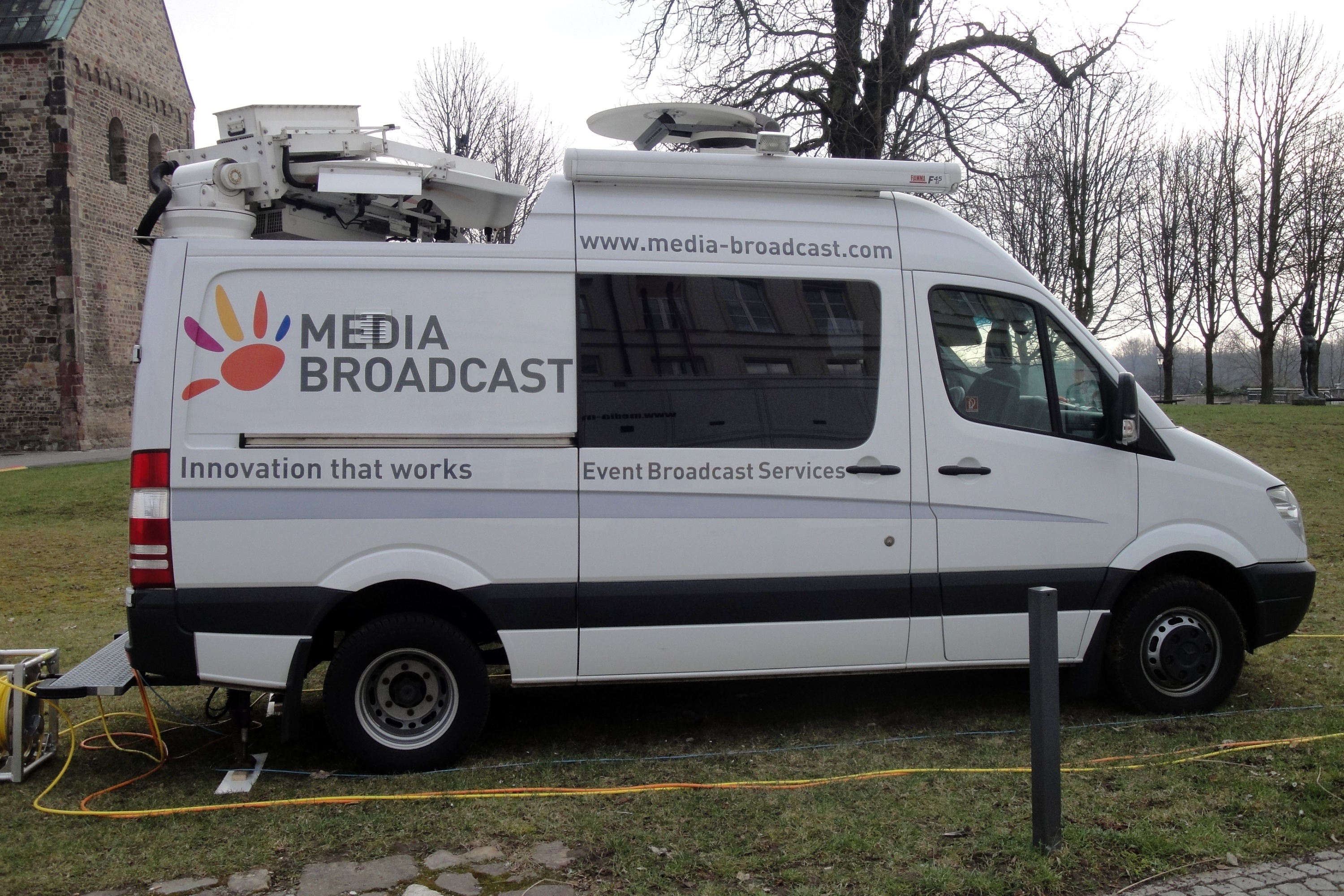 Mercedes-Benz Sprinter II Übertragungswagen Media Broadcast